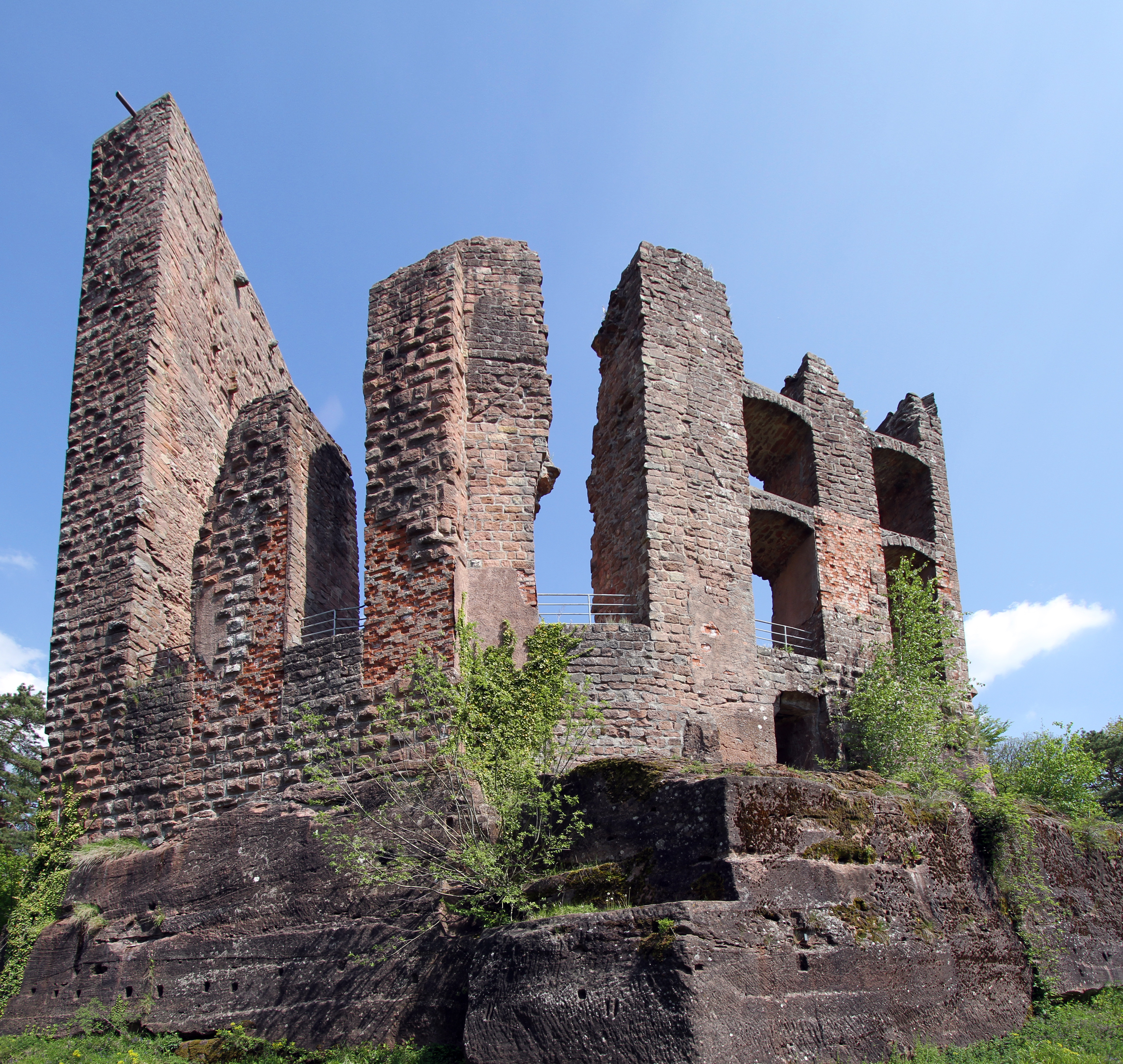 Ruine Ramburg in der Pfalz